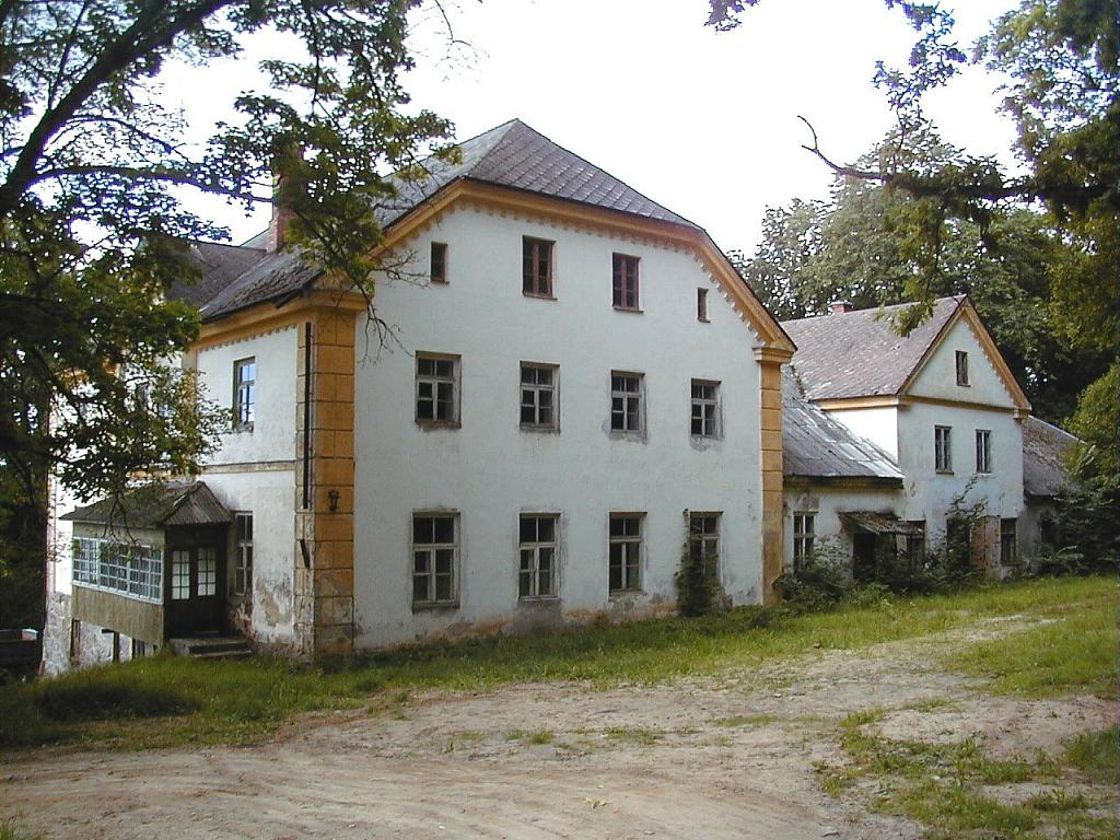 Lauteres muižas pils 2001-08-25